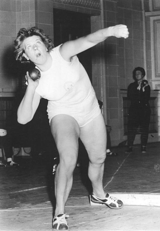 Johanna Lüttge Zentralbild Leipzig-Wlocka 27.01.1957 Leichtathletikhallenwettkämpfe in Leipzig. Am Sonnabend, dem 26.01.1957, fanden in der Sporthalle der Deutschen Hochschule für Körperkultur und Sport in Leipzig Leichtathletik-Hallenwettkämpfe statt. UBz: Im Kugelstossen der Frauen war die Olympiateilnehmerin Johanna Lüttge nicht zu schlagen. Sie gewann mit einer Weite von 13,50 m. Abgebildete Personen: Hübner, Johanna: Leichtathletin, DDR